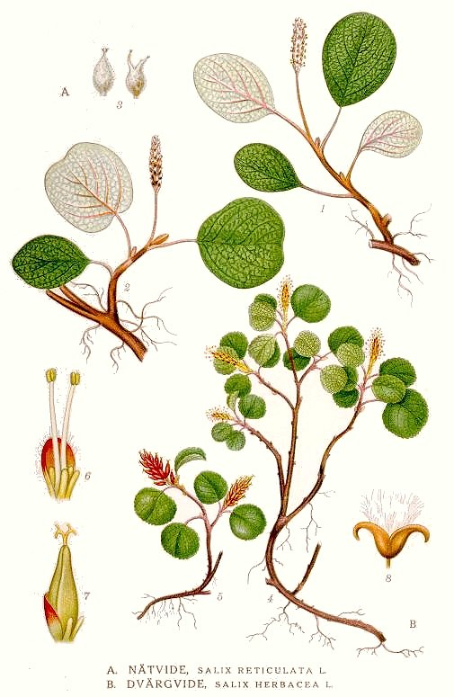 Salix reticulata L., Salix herbacea L. Original Description A. Nätvide, Salix reticulata L. B. Dvärgvide, Salix herbacea L.